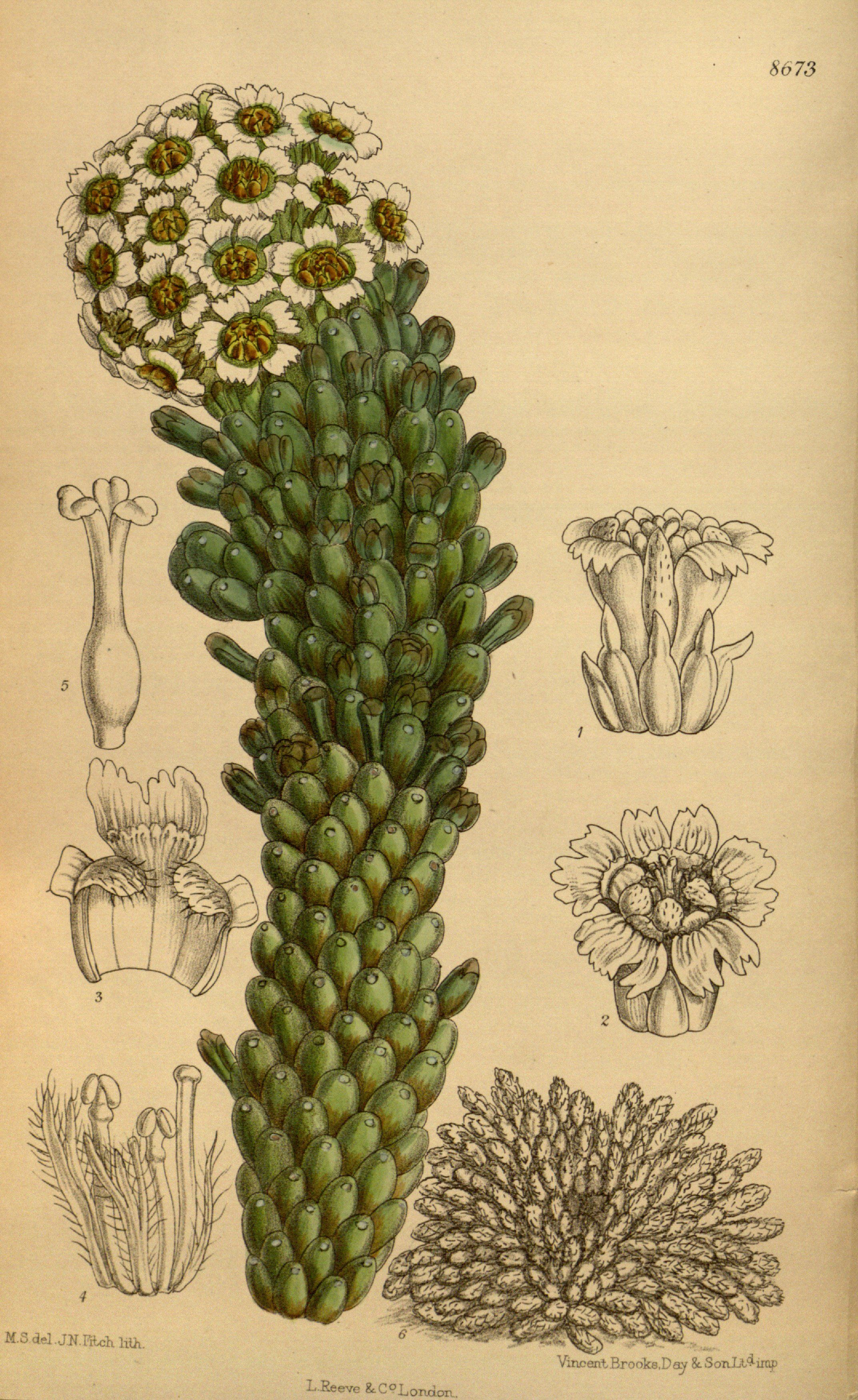 Euphorbia caput-medusae, Euphorbiaceae